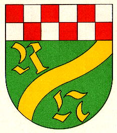 Wappen von Rötsweiler-Nockenthal